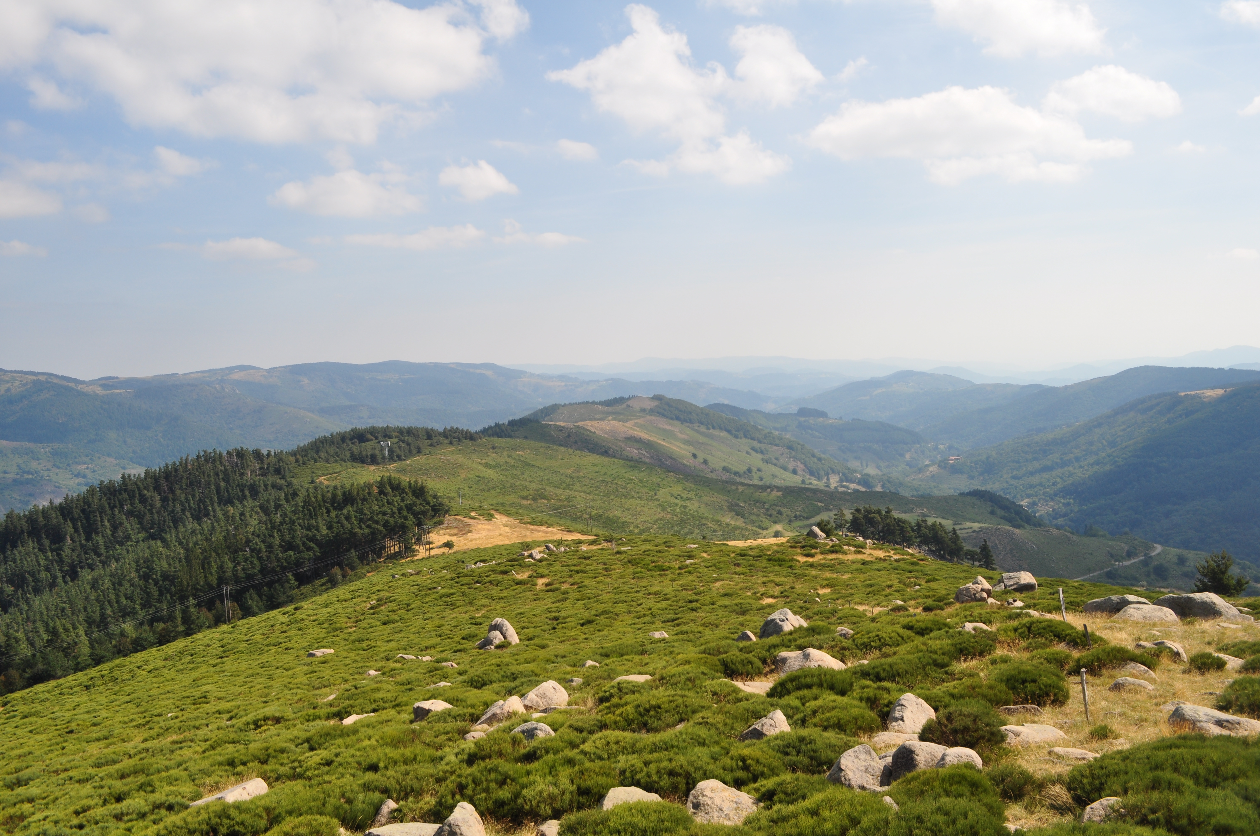 La partie Est du Serre de Champ Maux à Albon-d'Ardèche